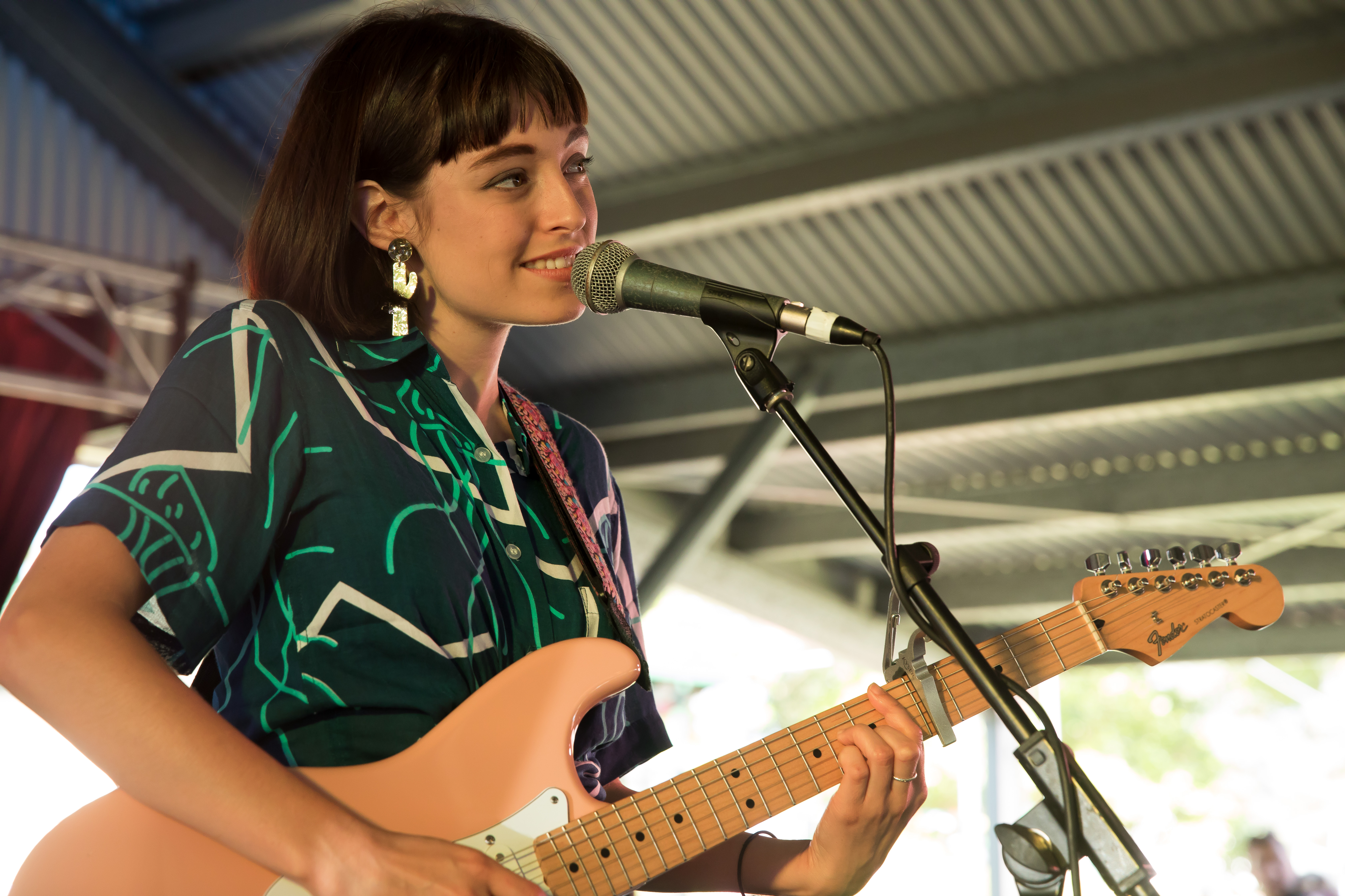 Stella Donnelly